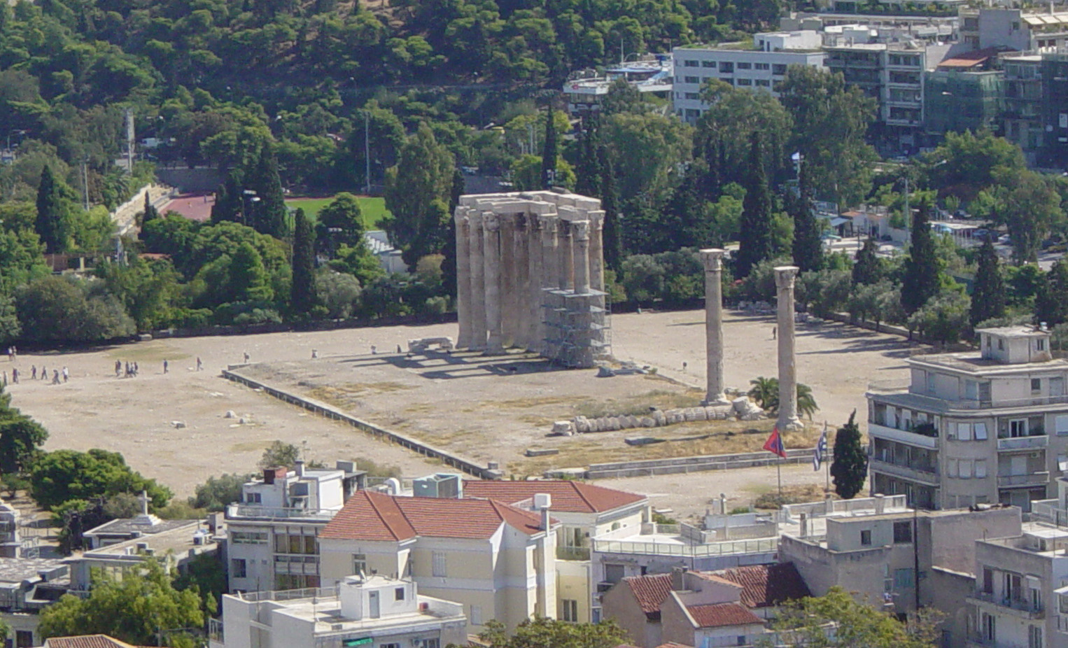 Tempel des Zeus, Athen